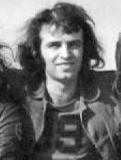 Rusznák Iván az M7 együttes gitárosaként.